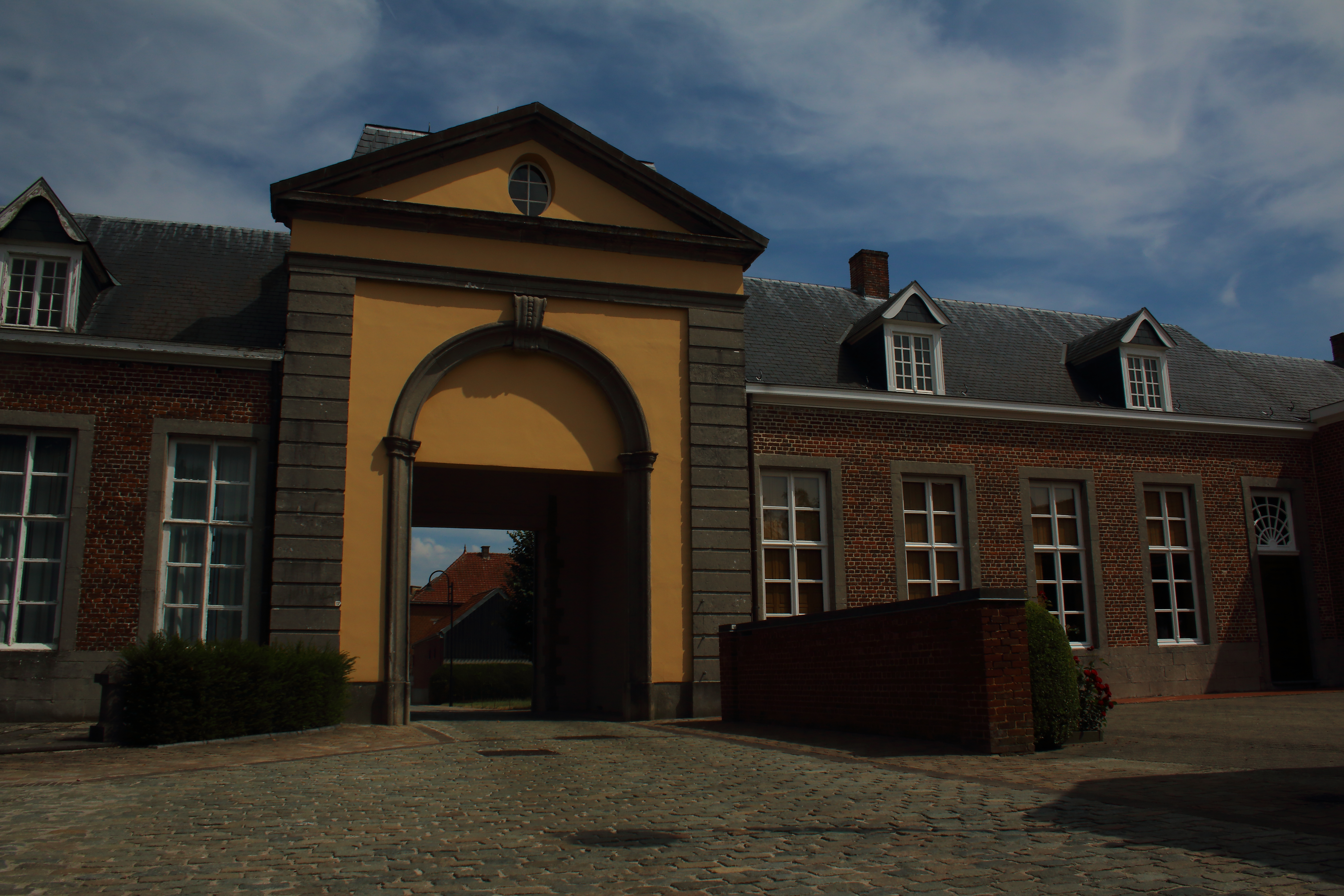 Kartuizerprorij Sint-Martens-Bos, Sint-Martens-Lierde, Lierde, Vlaanderen, België